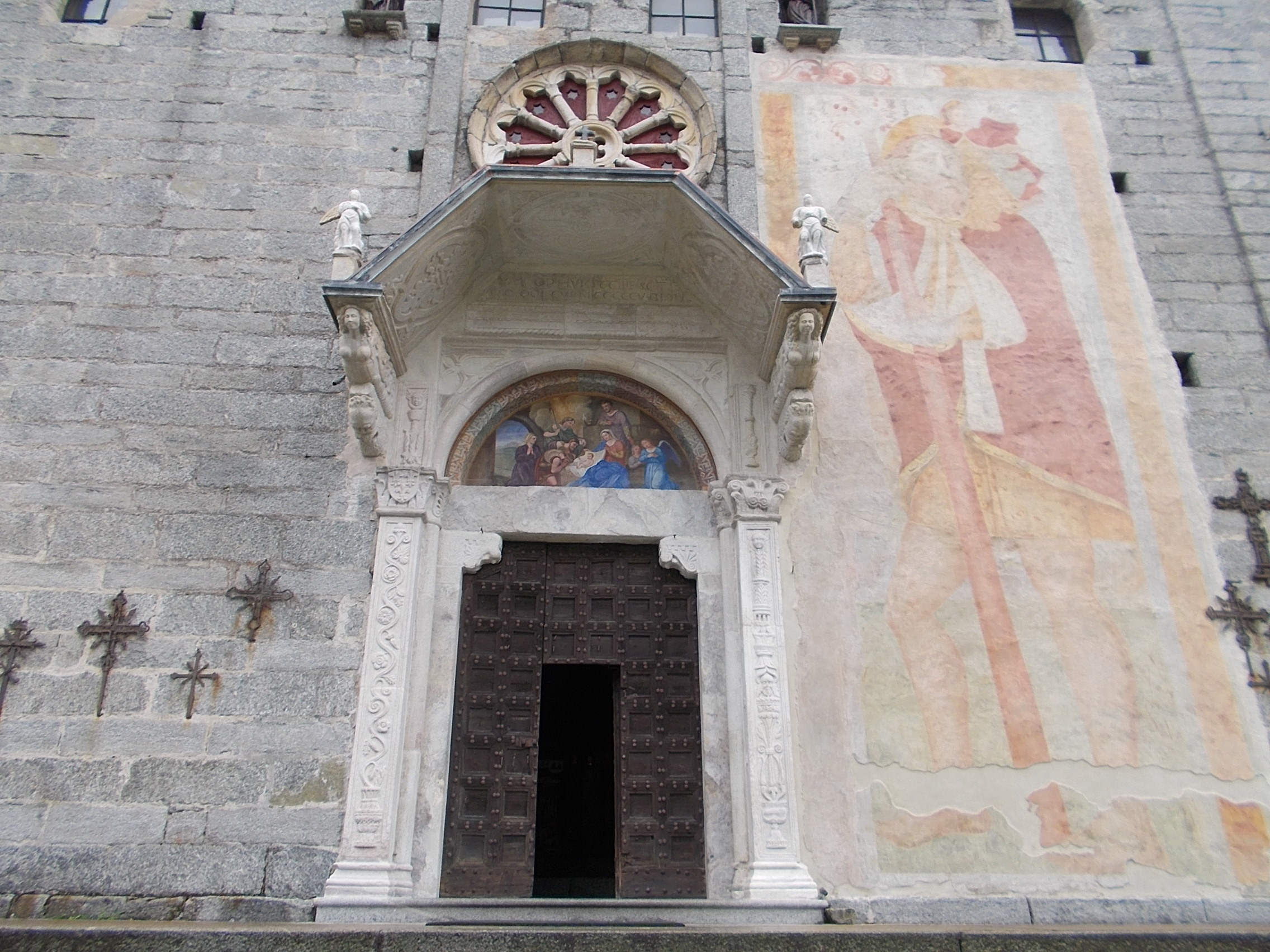 Chiesa Monumentale Baceno This is a photo of a monument which is part of cultural heritage of Italy.